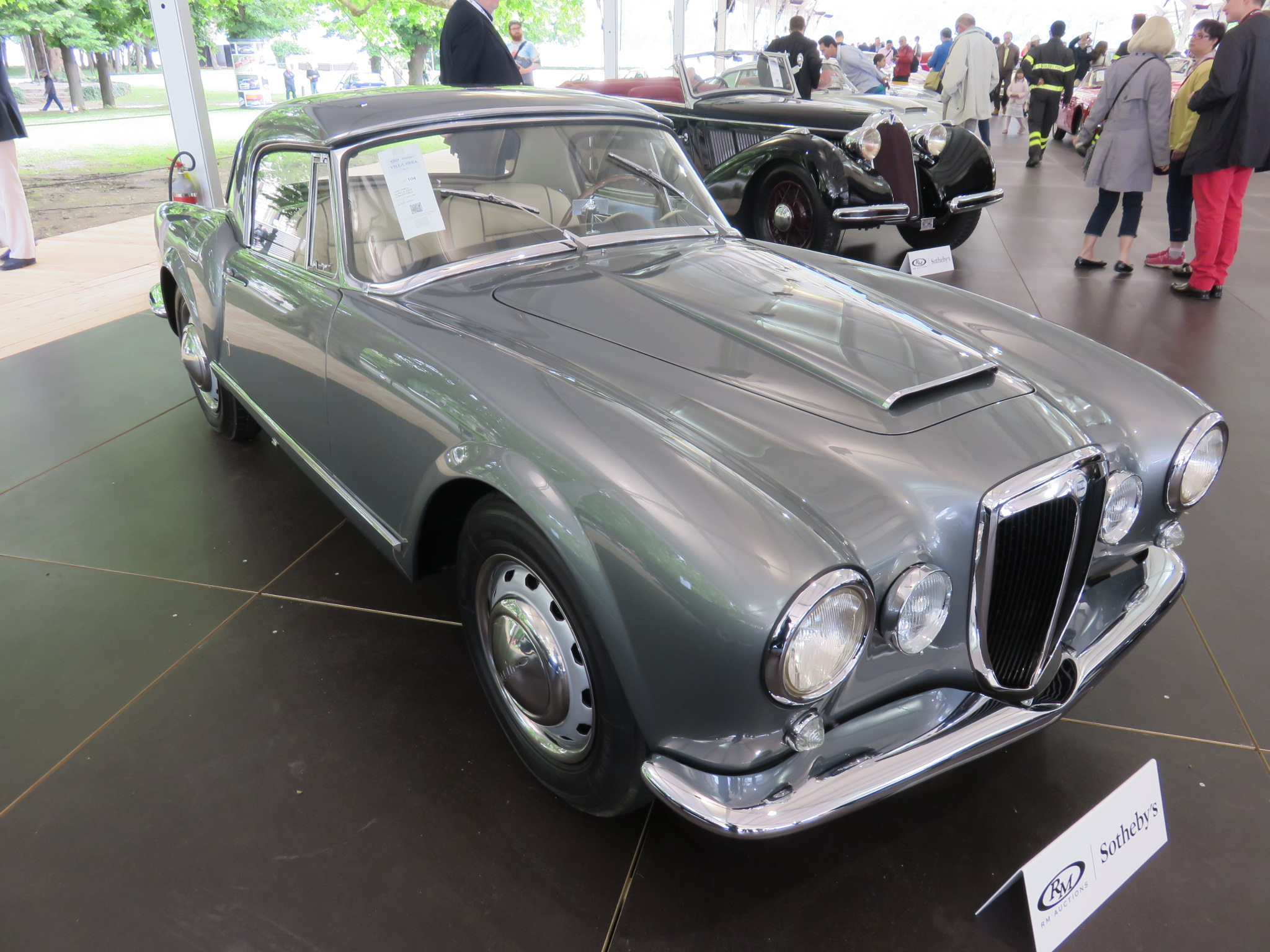 Lancia Aurelia B24 S, cabriolet avec hard top, 1958, vente aux enchères du concours d'élégance Villa d'Este 2015